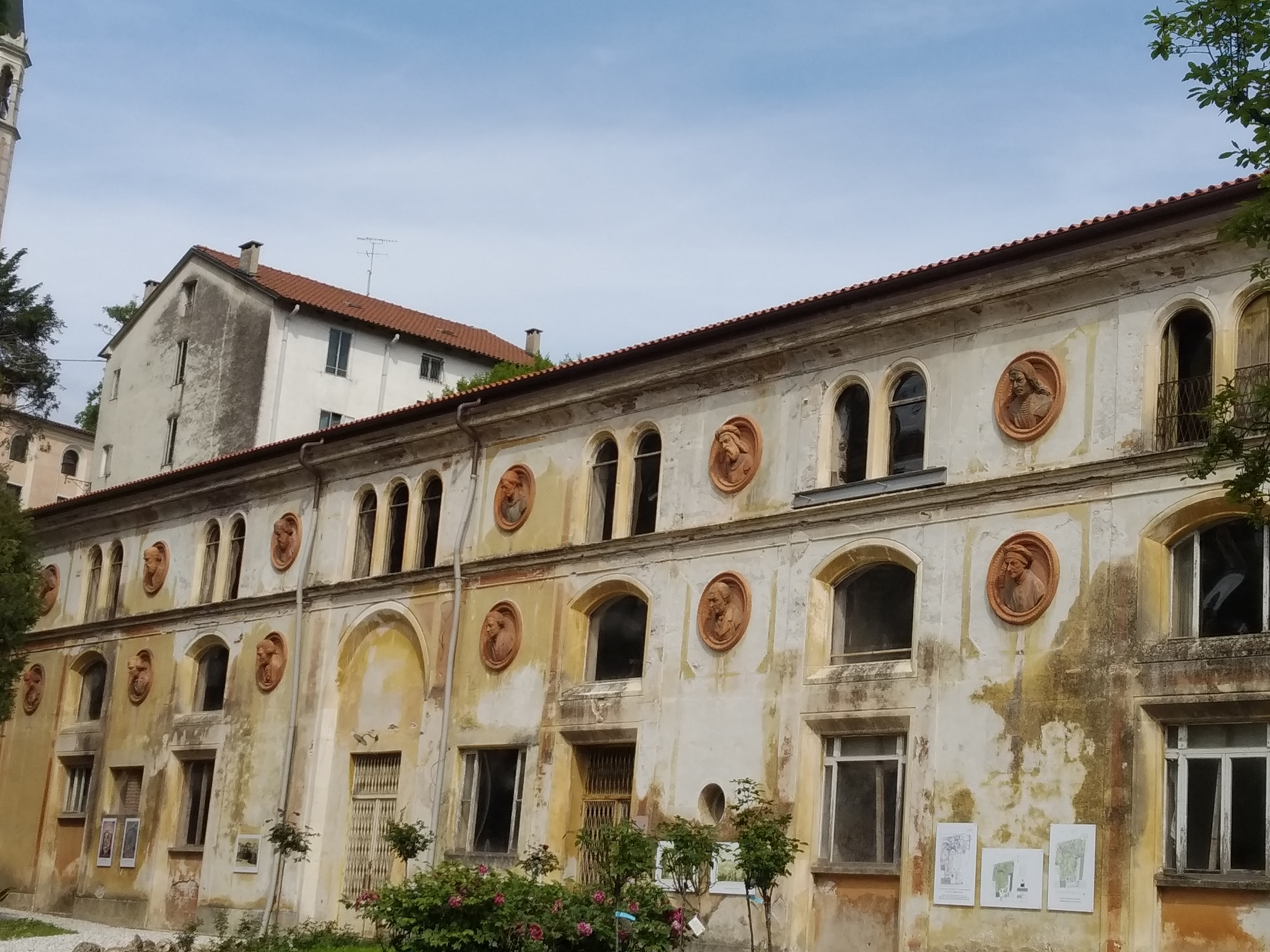 Facciata del Teatro del Giardino Jacquard con la doppia fila di medaglioni